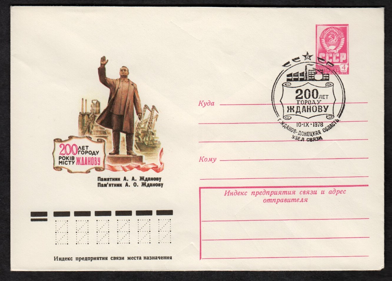 Жданов. Памятник Жданову, почтовый конверт